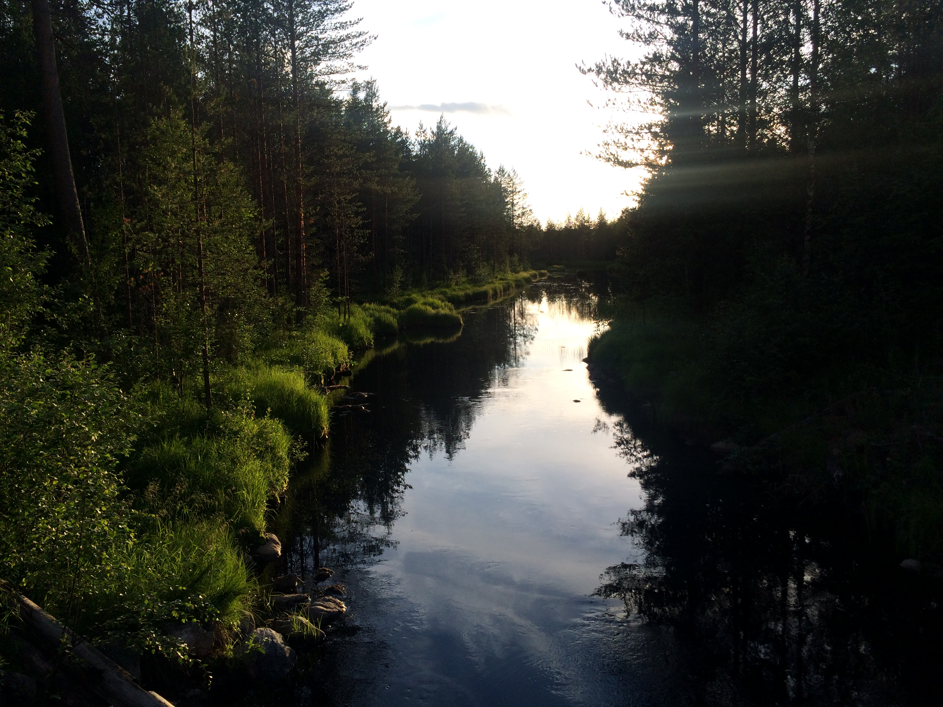 Иляйоки